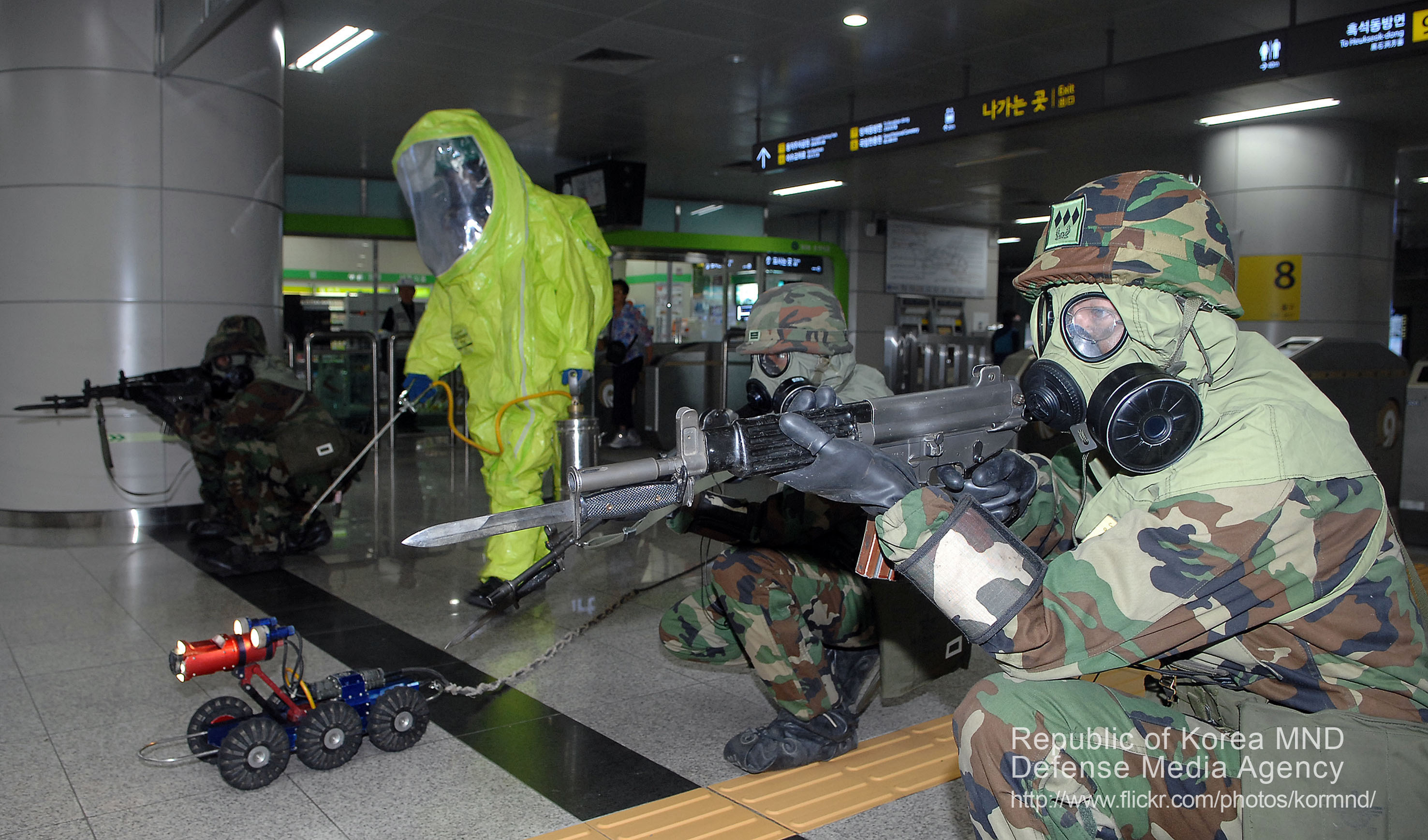 2011 국방화보 Rep. of Korea, Defense Photo Magazine 육군52사단 장병들이 독가스살포 테러범에대한 경계태세를 갖춘 가운데 지하탐사로봇을 이용해 테러 원점 탐색을 준비하고 있다.